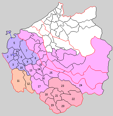 滋賀県蒲生郡の町村制時点の町村。